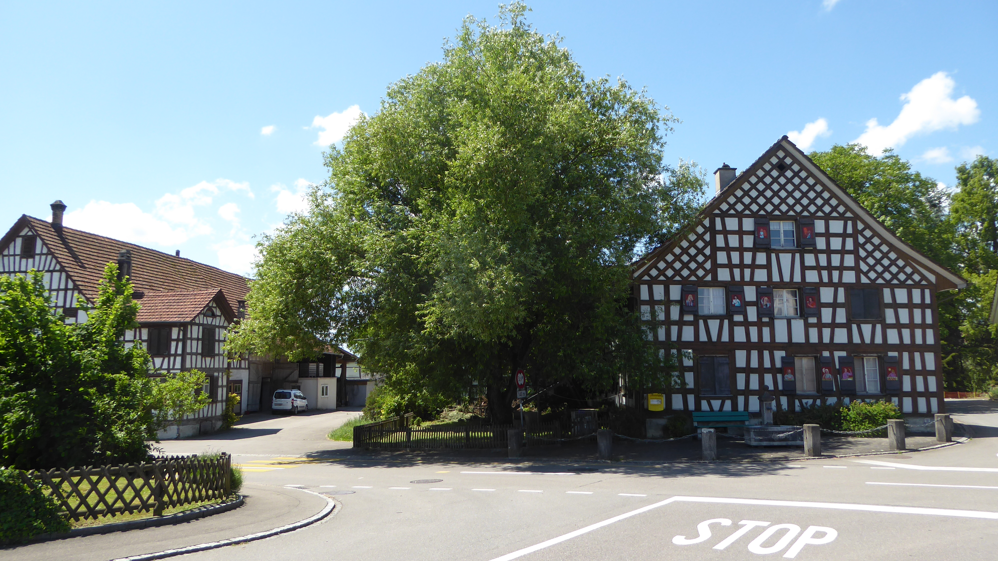 Ennetaach